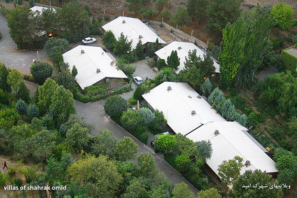 شهرک امید ، تهران ، ویلائی های شهرک امید